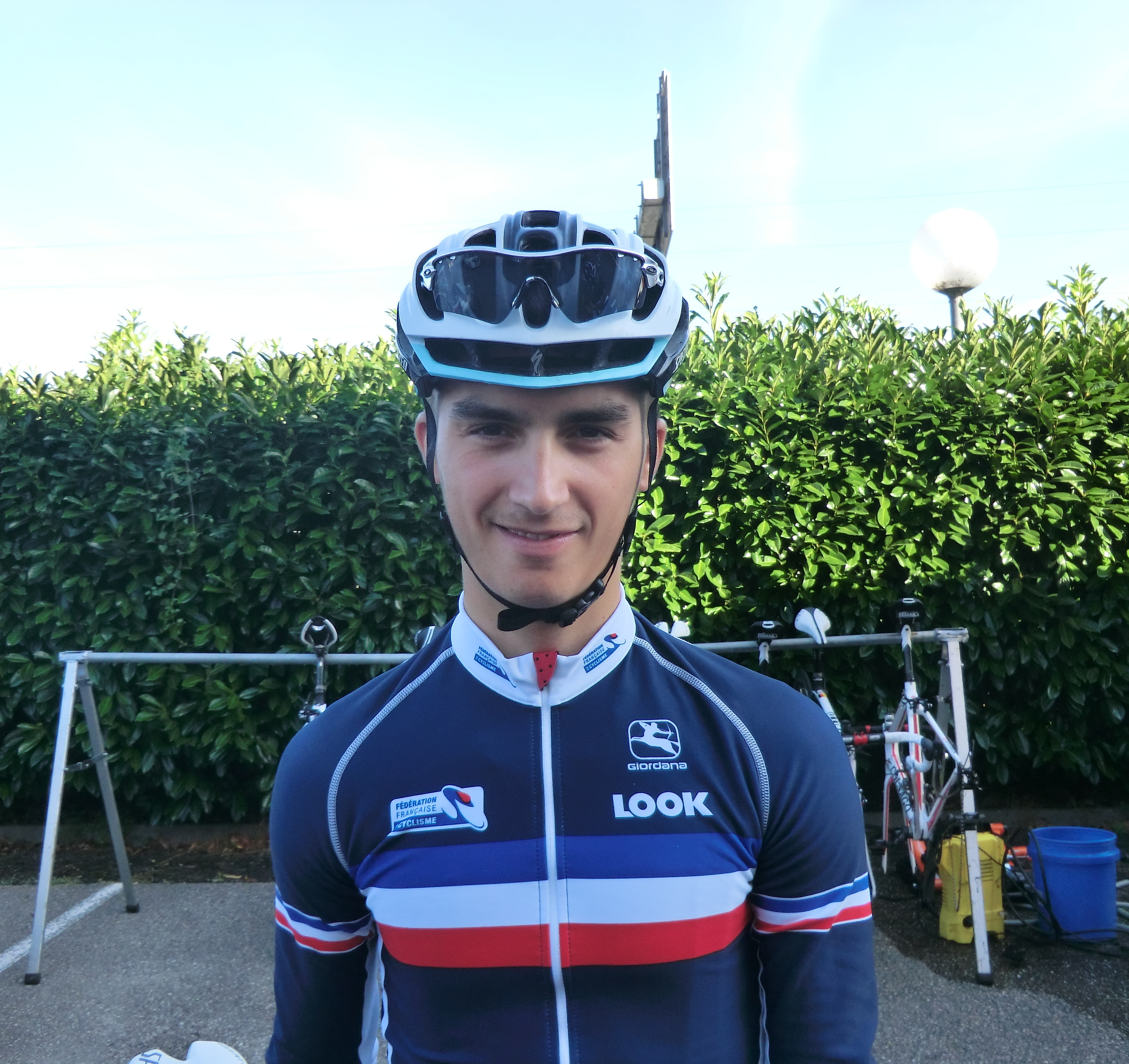 Coureurs à l'échauffement au matin du prologue du tour de l'Ain 2013, à l'hôtel Lyon-Est à Saint-Maurice-de-Beynost.